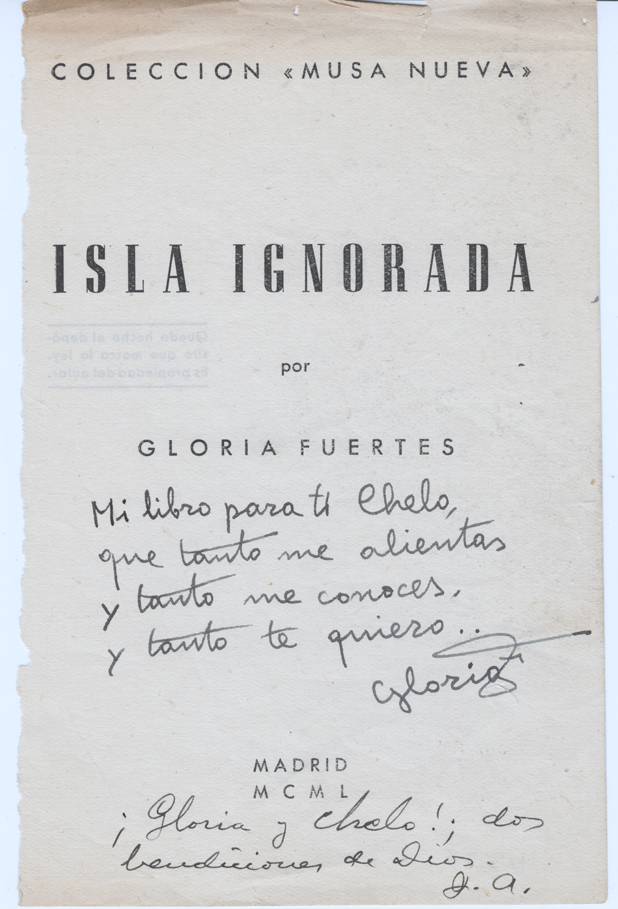 ‘Gloria Fuertes, centenario’ aborda por primera vez la vida y el legado de la poeta madrileña Gloria Fuertes en una gran exposición. La delegada de Cultura y Deportes, Celia Mayer, ha presentado esta mañana en el Teatro Fernán Gómez. Centro Cultural de la Villa la primera muestra sobre Fuertes que da arranque a las actividades programadas como homenaje al centenario de su nacimiento que se cumple este año.